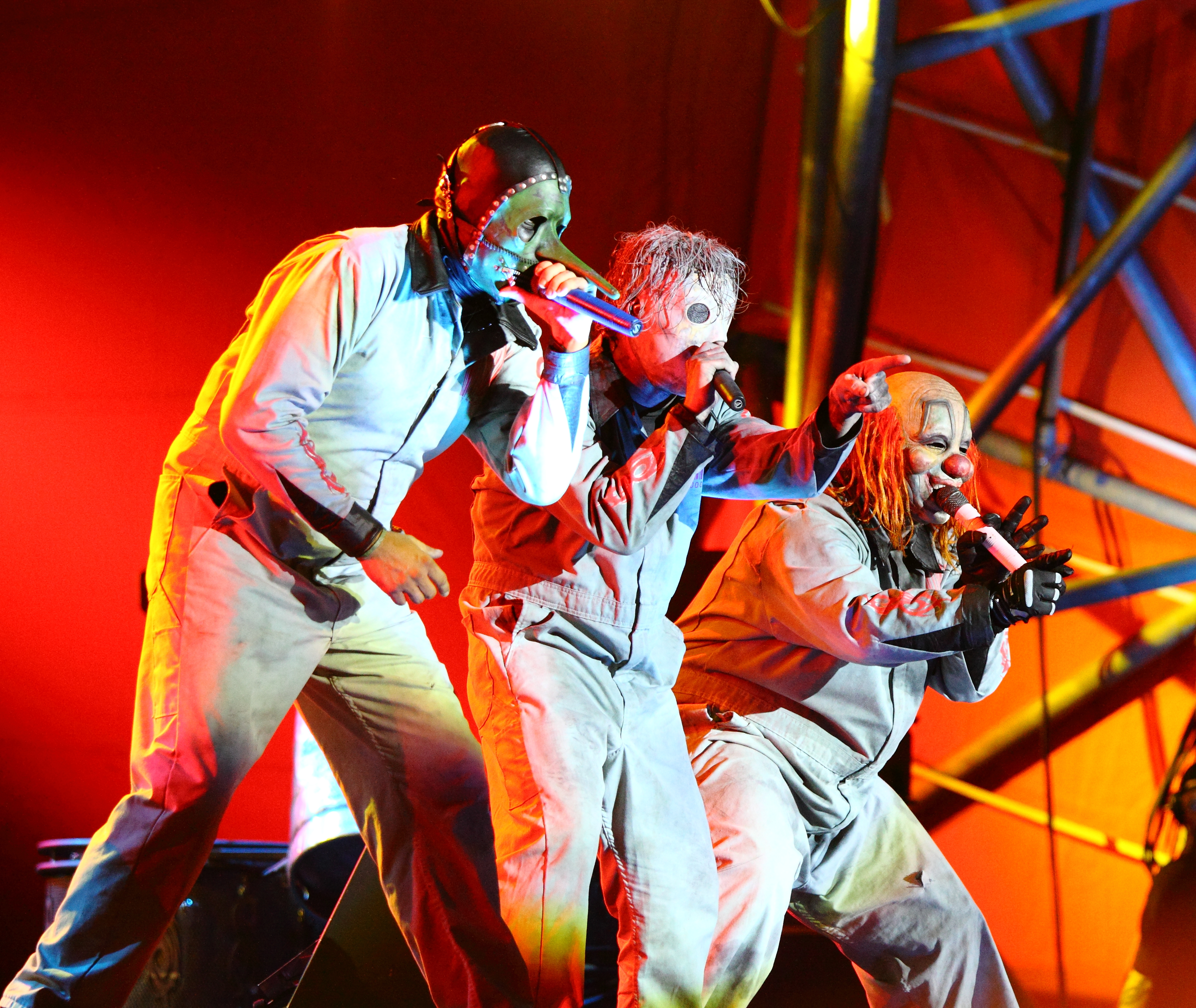 Slipknot live at Roskilde Festival 2013.